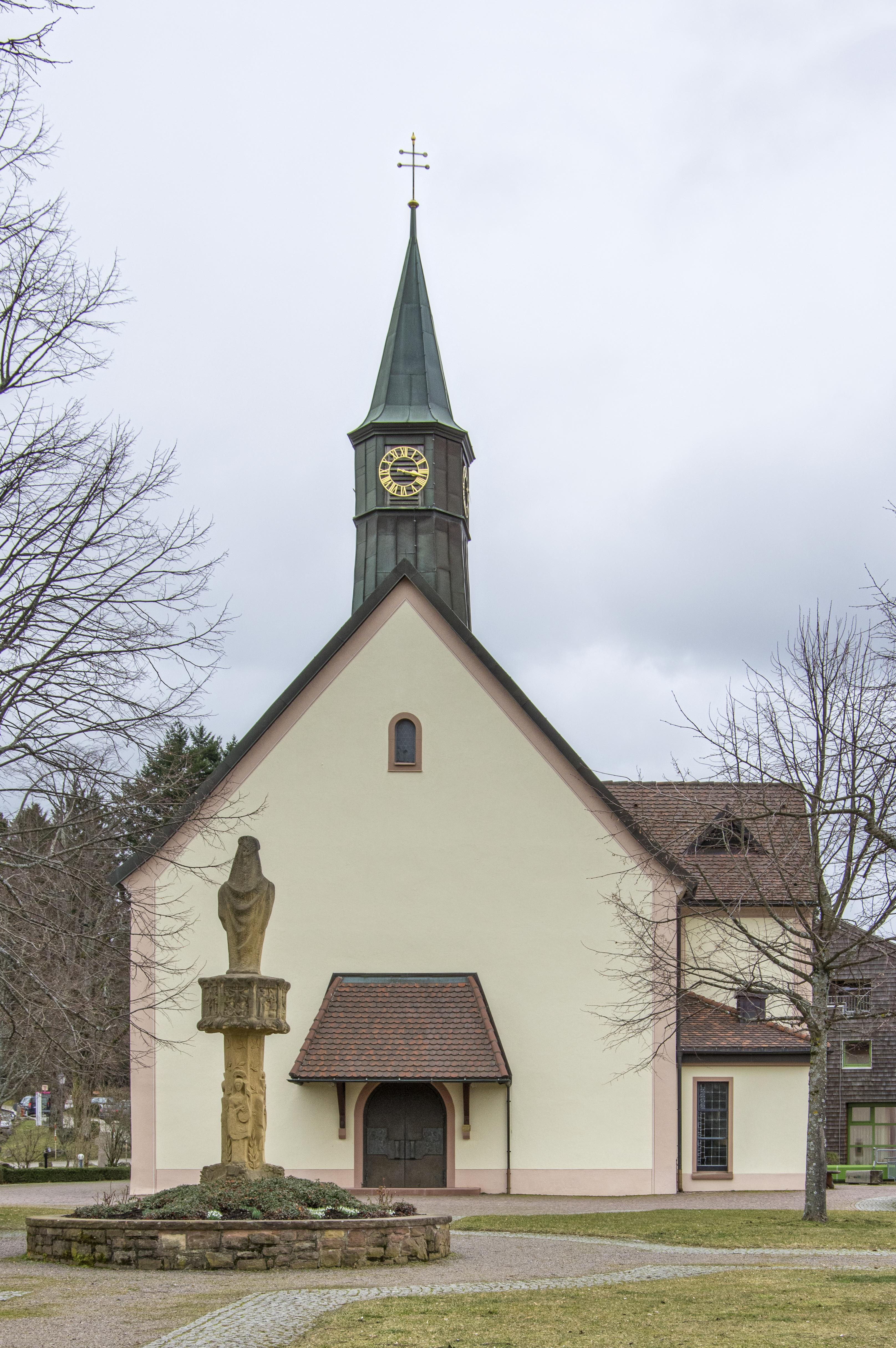 Bilder von der Wallfahrt Maria Lindenberg Blick zum Haupteingang von Maria Lindenberg